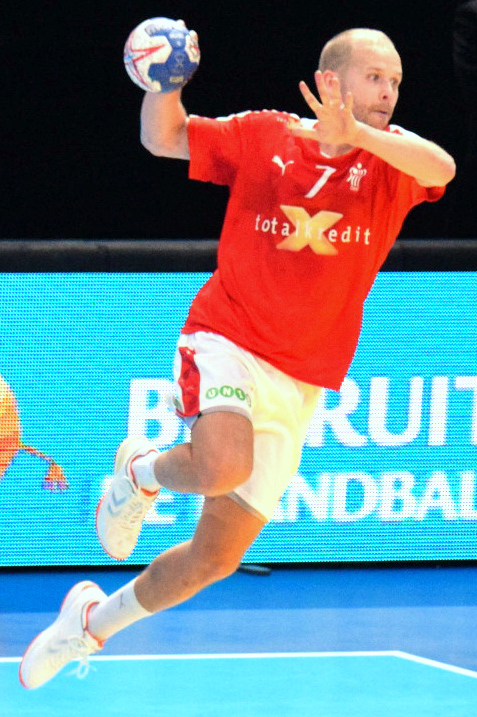 Anders Eggert le 10 janvier 2016 lors du match France / Danemark durant la Golden League à l'AccorHotels Arena (Paris).